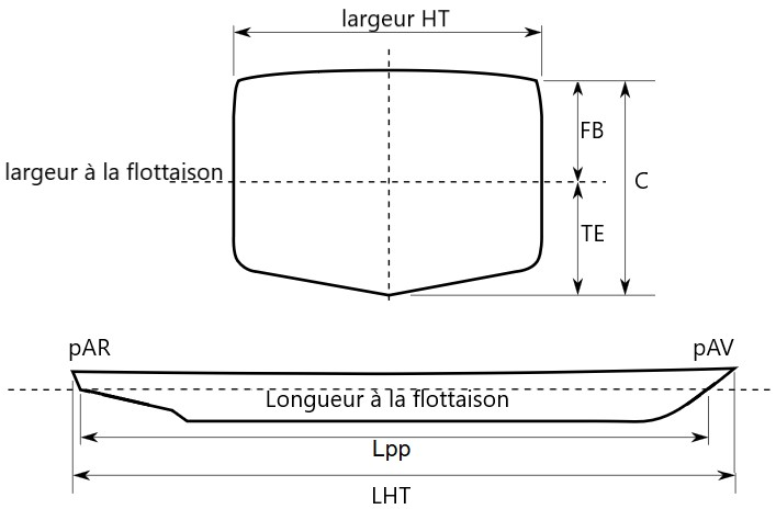 Dimensions principales de la coque d'un navire, déterminantes pour les calculs de base de place au port principalement, et dans le vocable de la marine marchande.